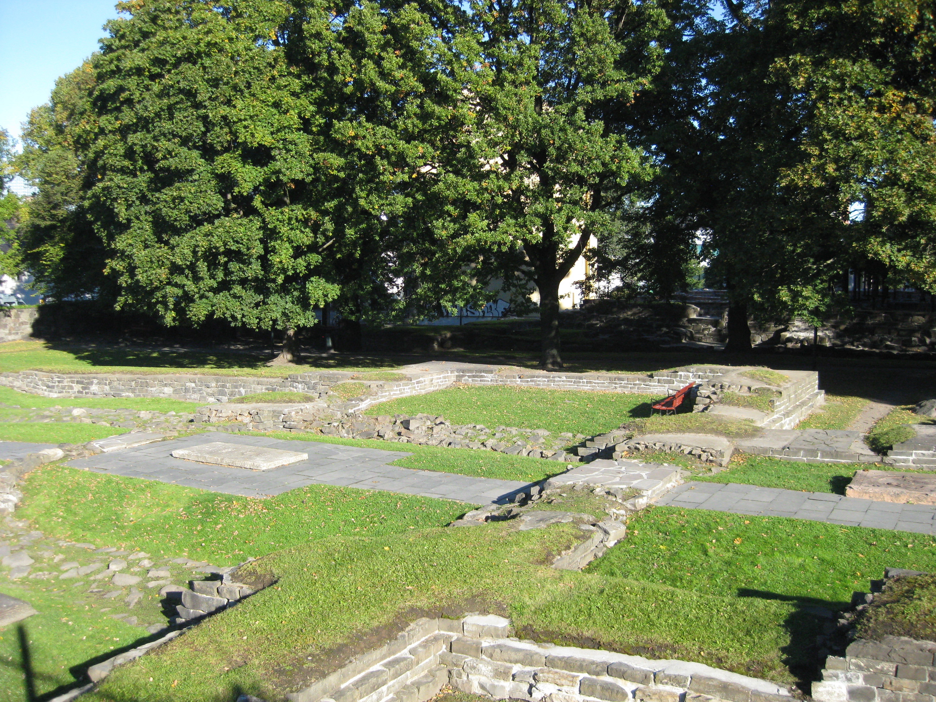 Hallvardskatedralen er Oslos tidligste domkirke. Domkirken ble oppført på høyden ved Gamlebyens markedsplass Oslo torg (krysset Bispegata – Oslo gate) under begynnelsen av 1100-tallet, og var i bruk som kirke til omkring 1655. Tverrskipet fra sør.